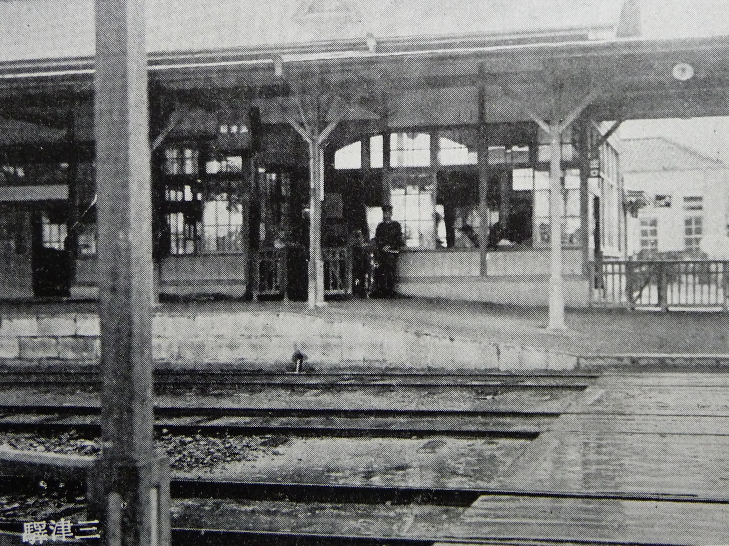 伊予鉄三津駅